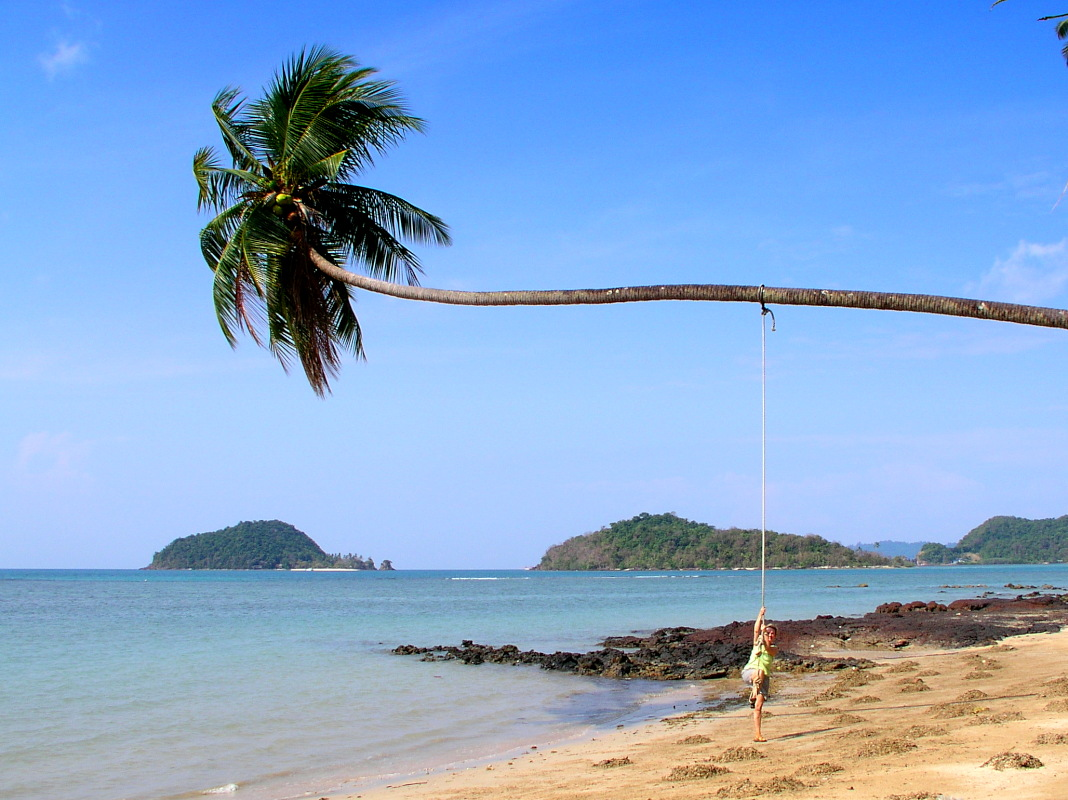 Koh Mak, Strand an der Westküste